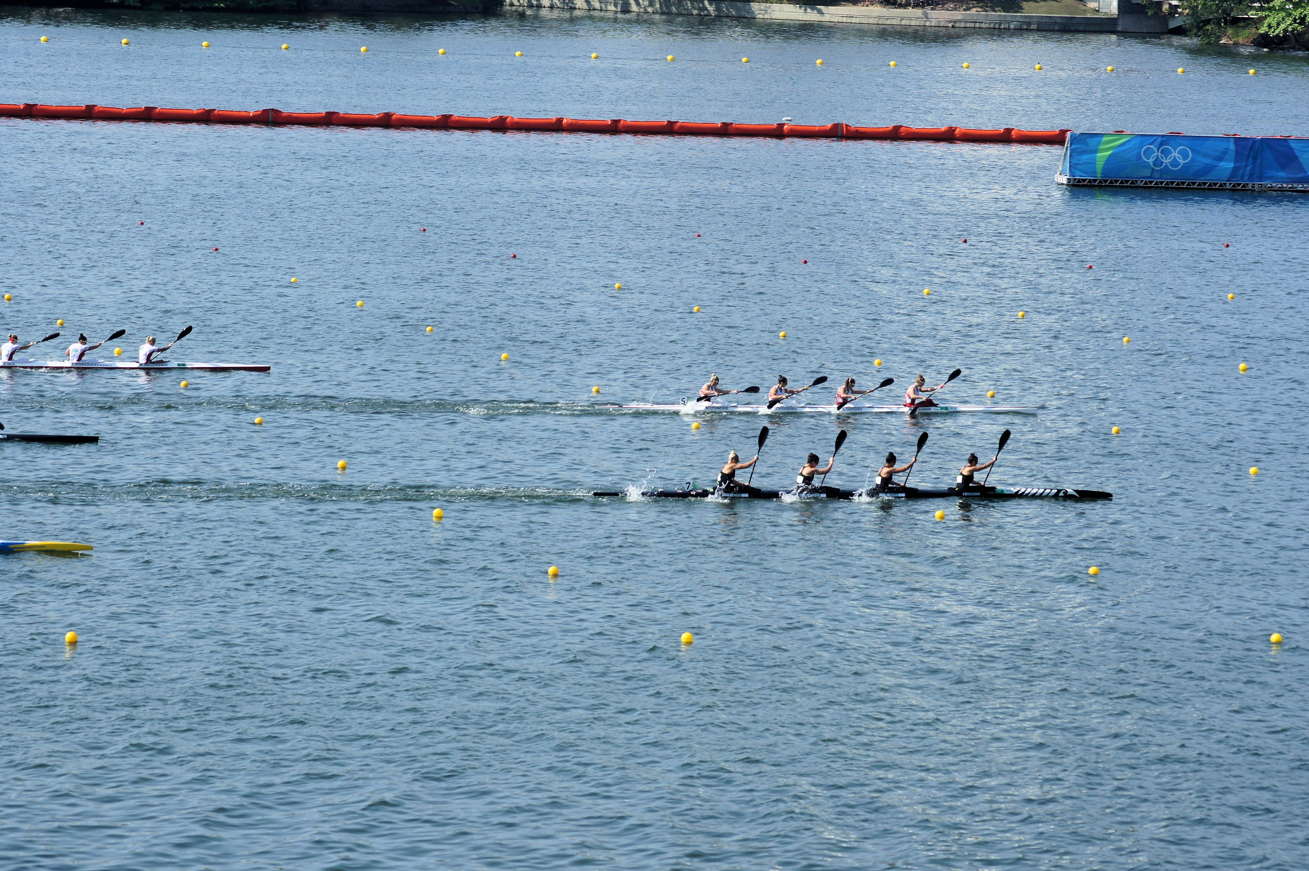 Rio 2016. Canoagem de velocidade/Canoe sprint